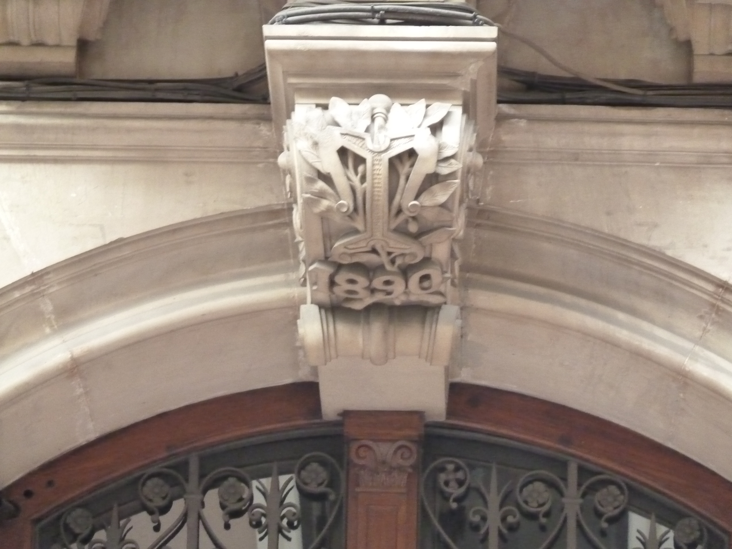 Reus